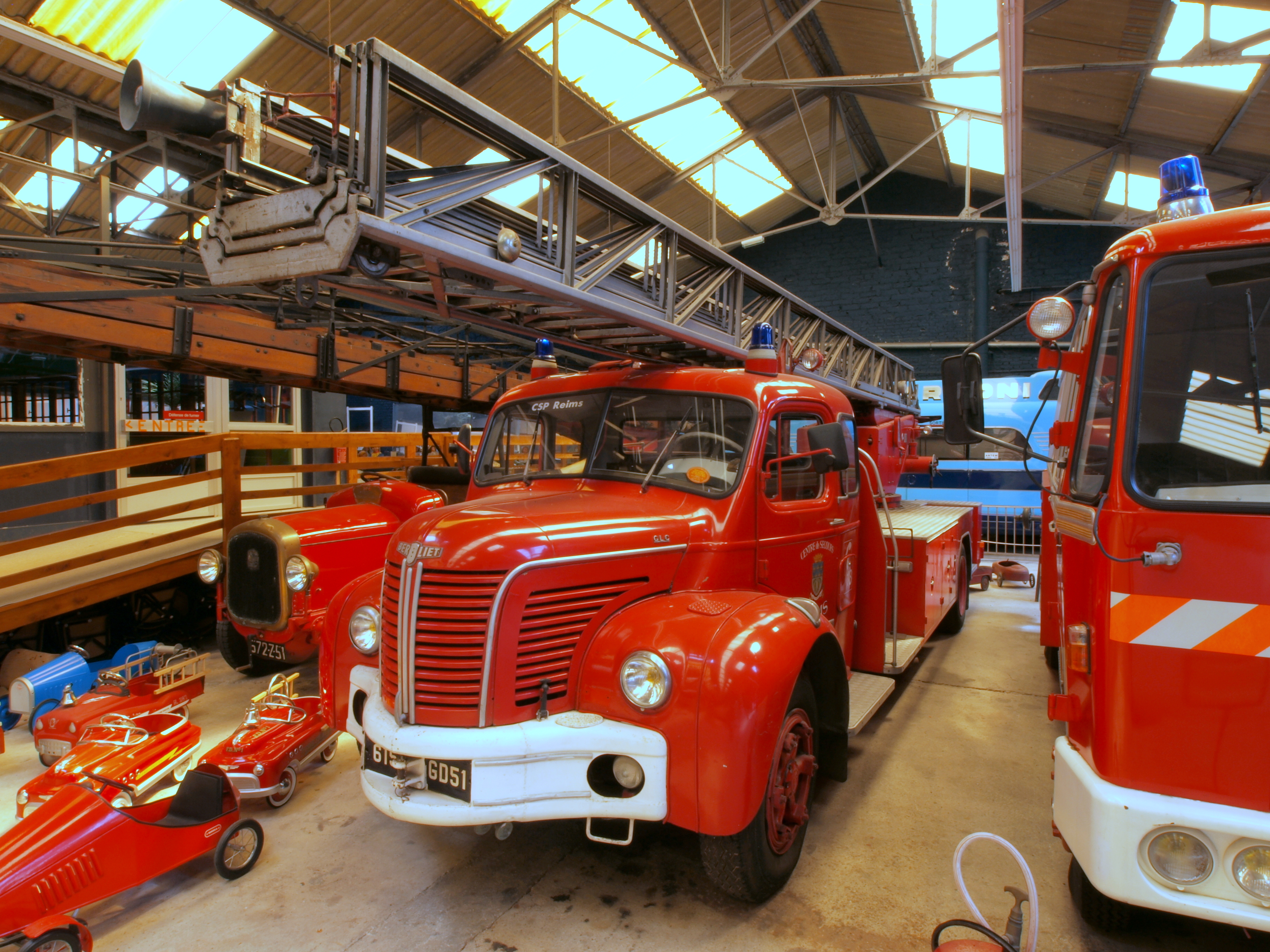 Berliet EPA30 GLR ladder